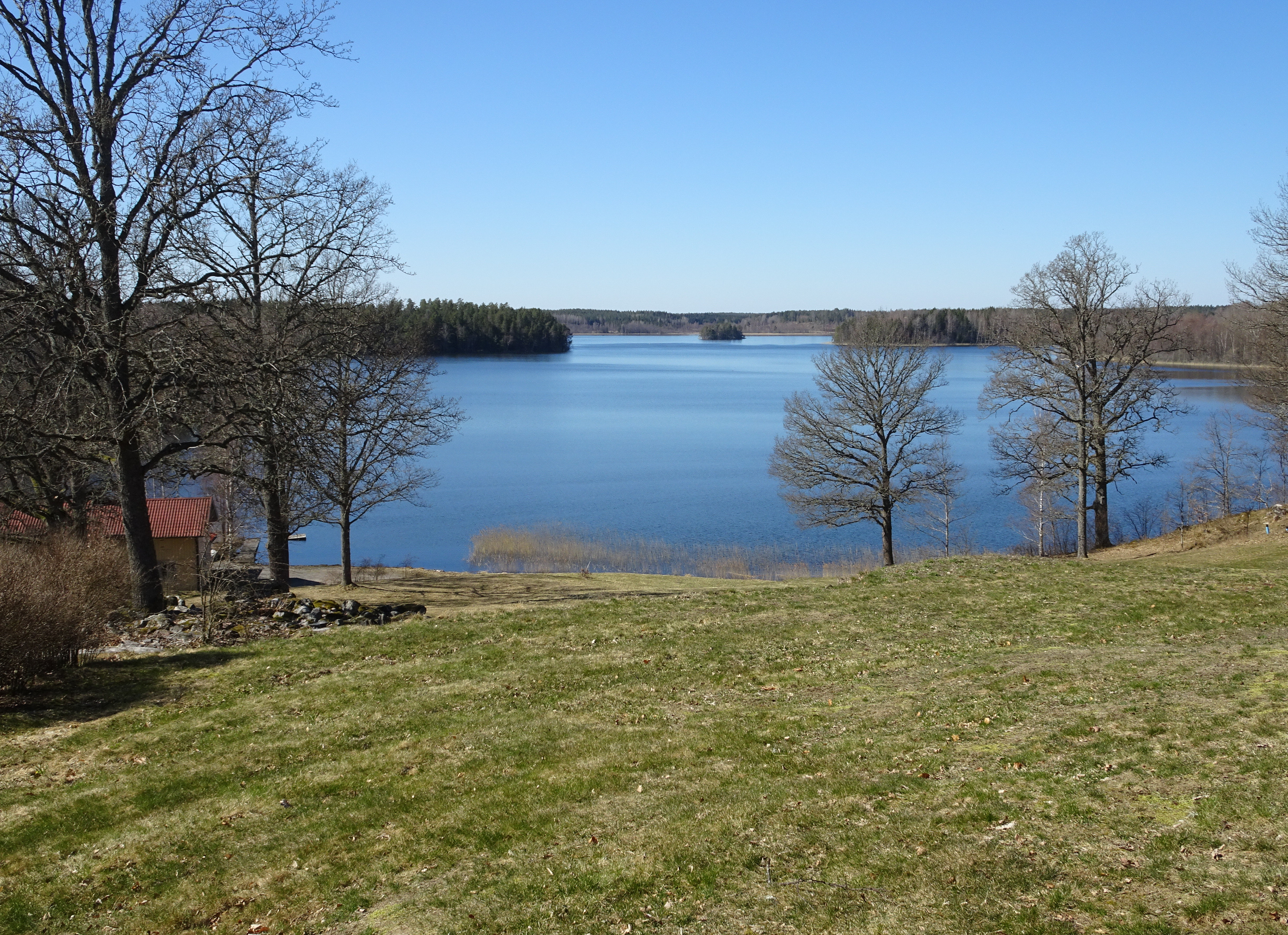 Ricksjön sedd från Jordanstorps huvudbyggnad